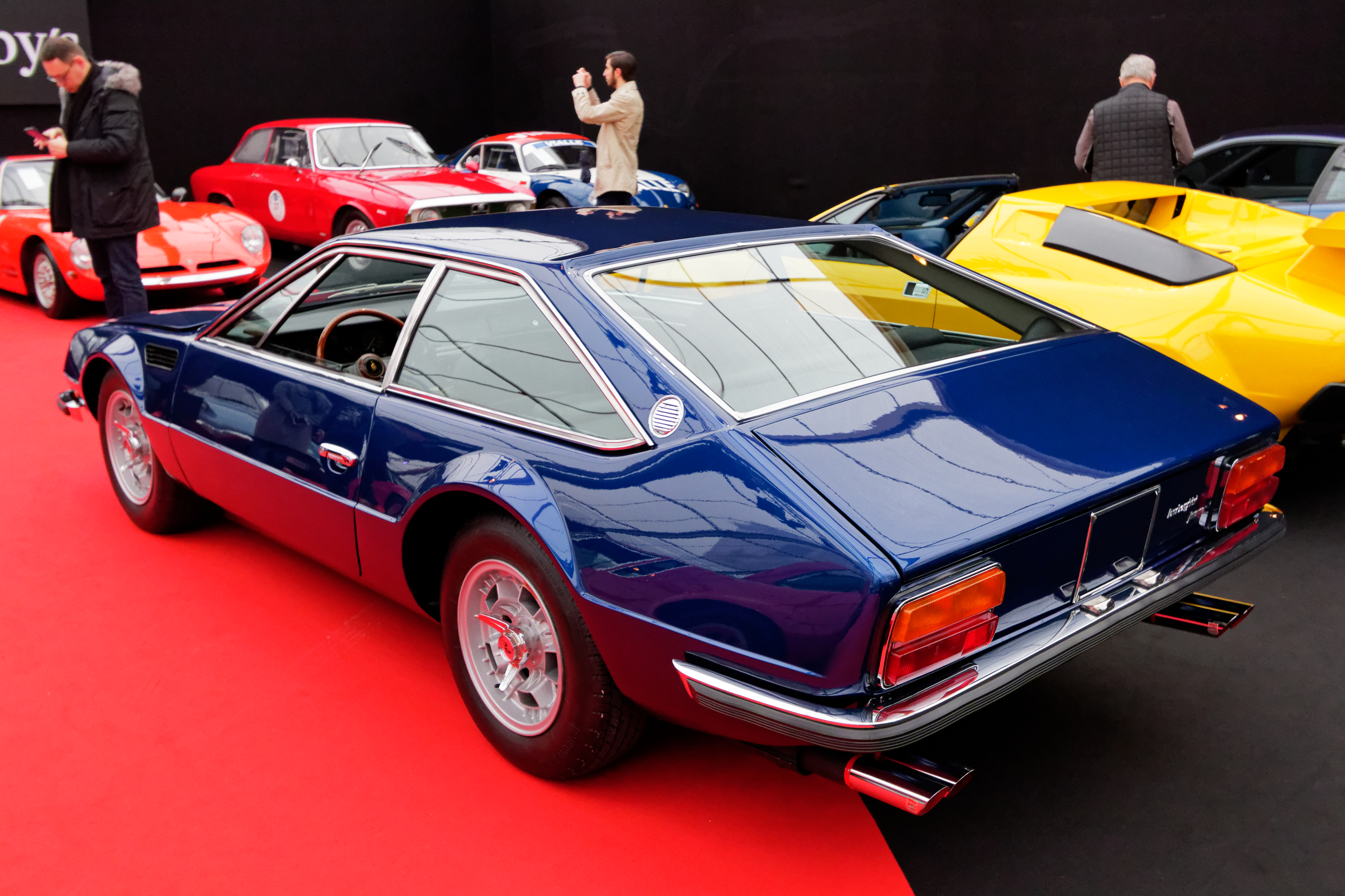 Un véhicule exposé lors de la vente RM Sotheby’s 2018 aux Invalides à Paris.